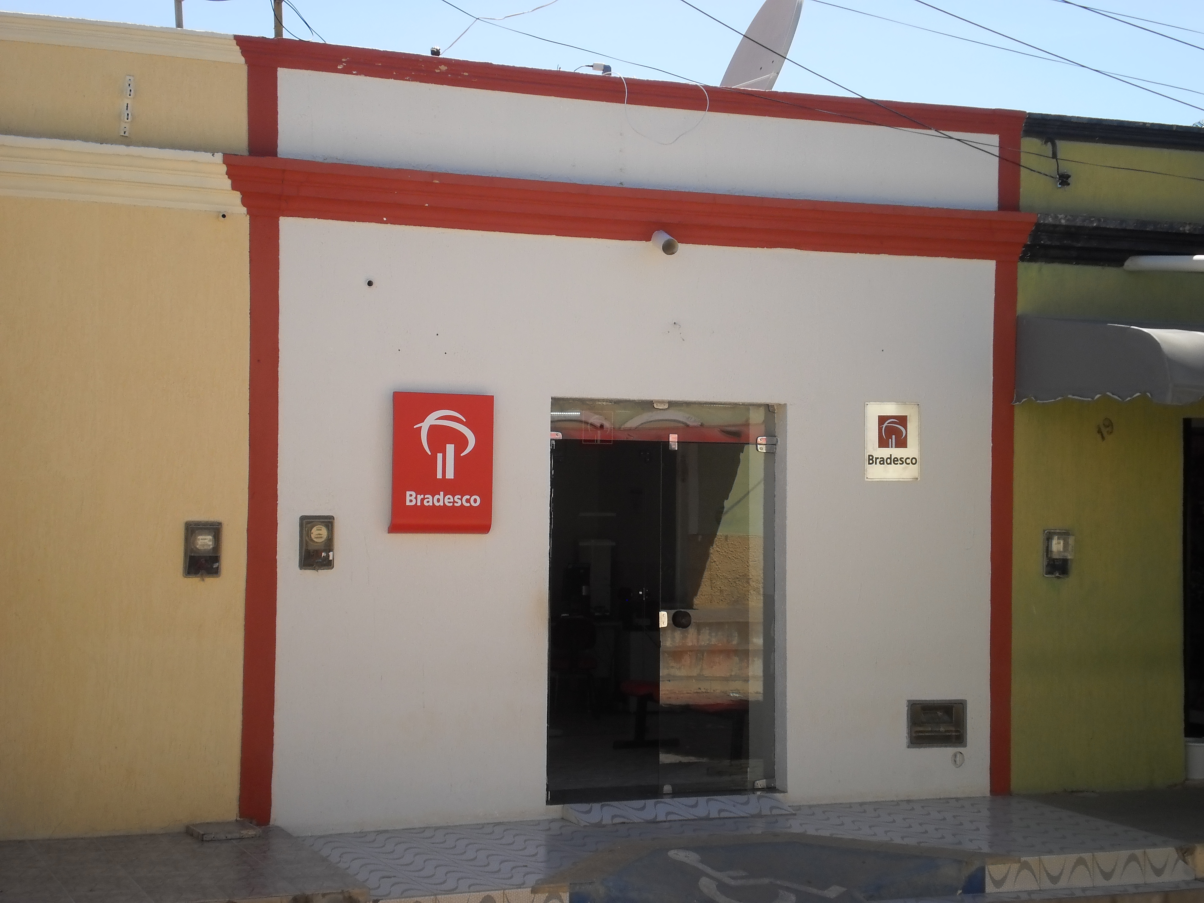 Agência do Bradesco. Portalegre, Rio Grande do Norte, Brasil.